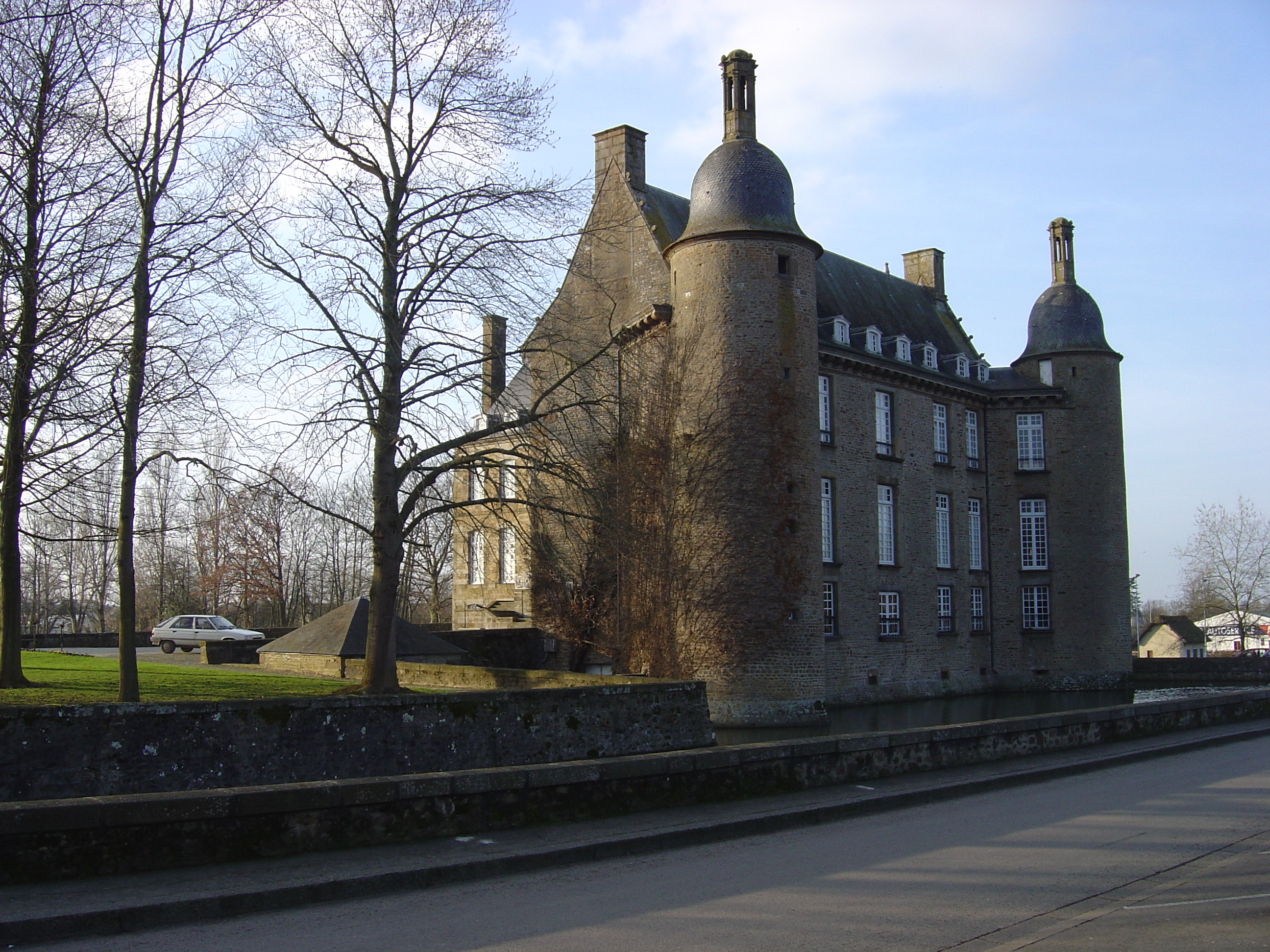 Photo du château de Flers prise le 04/02/07.